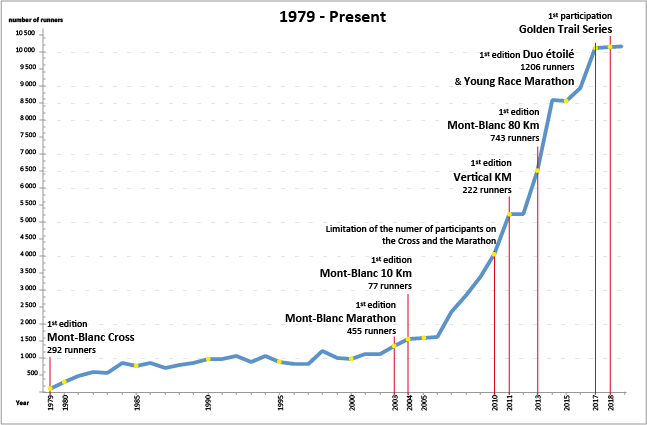 Évolution des courses du Marathon du Mont-Blanc avec par exemple l'apparition en 2004 du 10 km du Mont-Blanc depuis 1979 ainsi que du nombre de participants